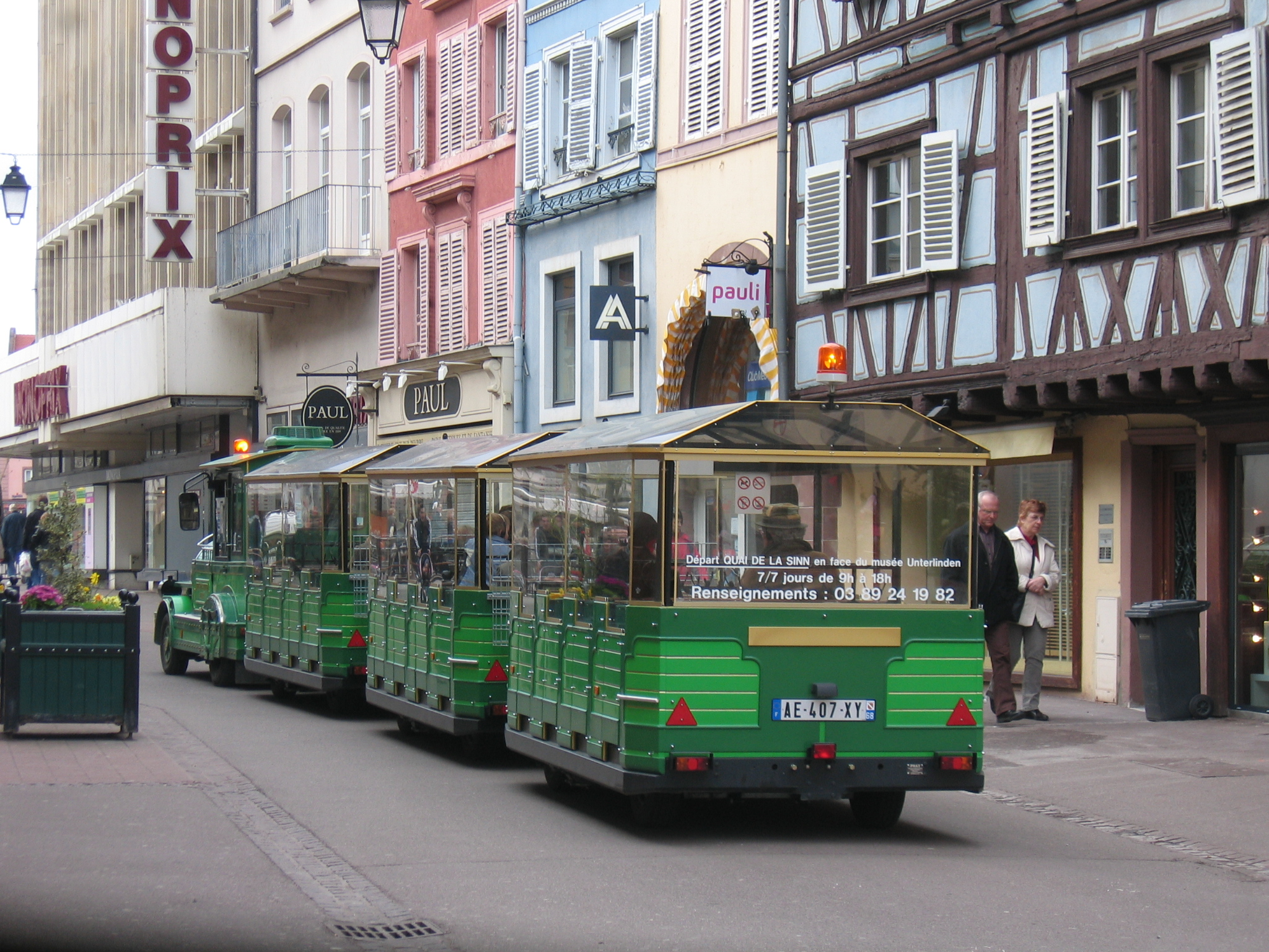 Le petit train touristique vert